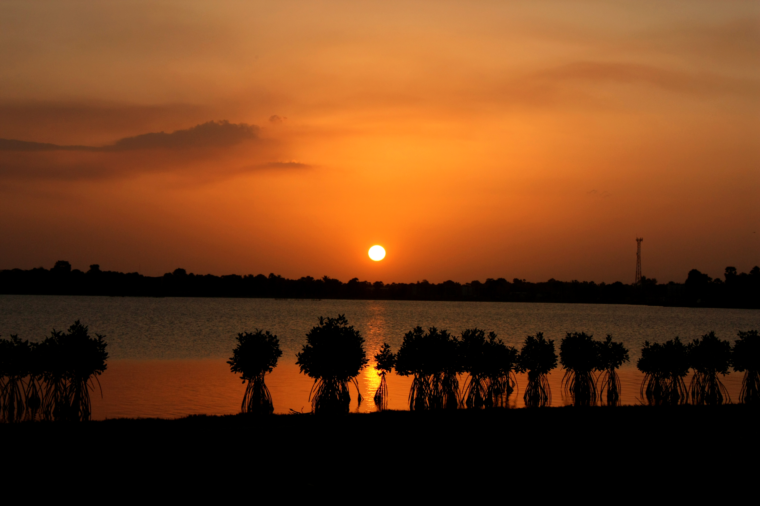 மட்டக்களப்பு வாவியினூடே ஓர் சூரிய அஸ்தமனக் காட்சி